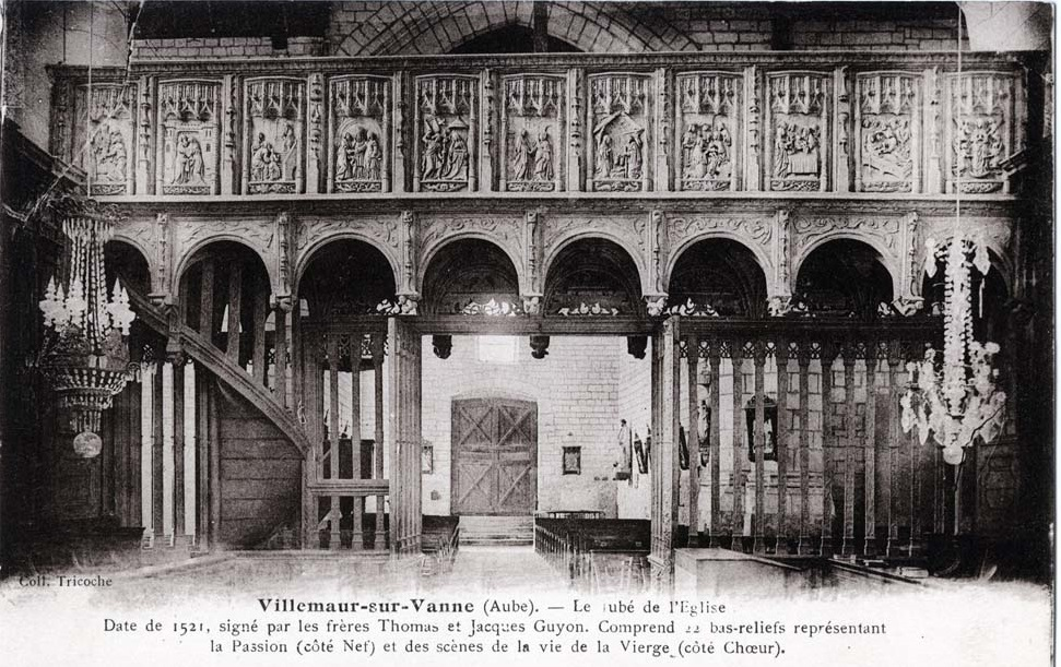 le jubé de Église de l'Assomption-de-la-Vierge de villemaur